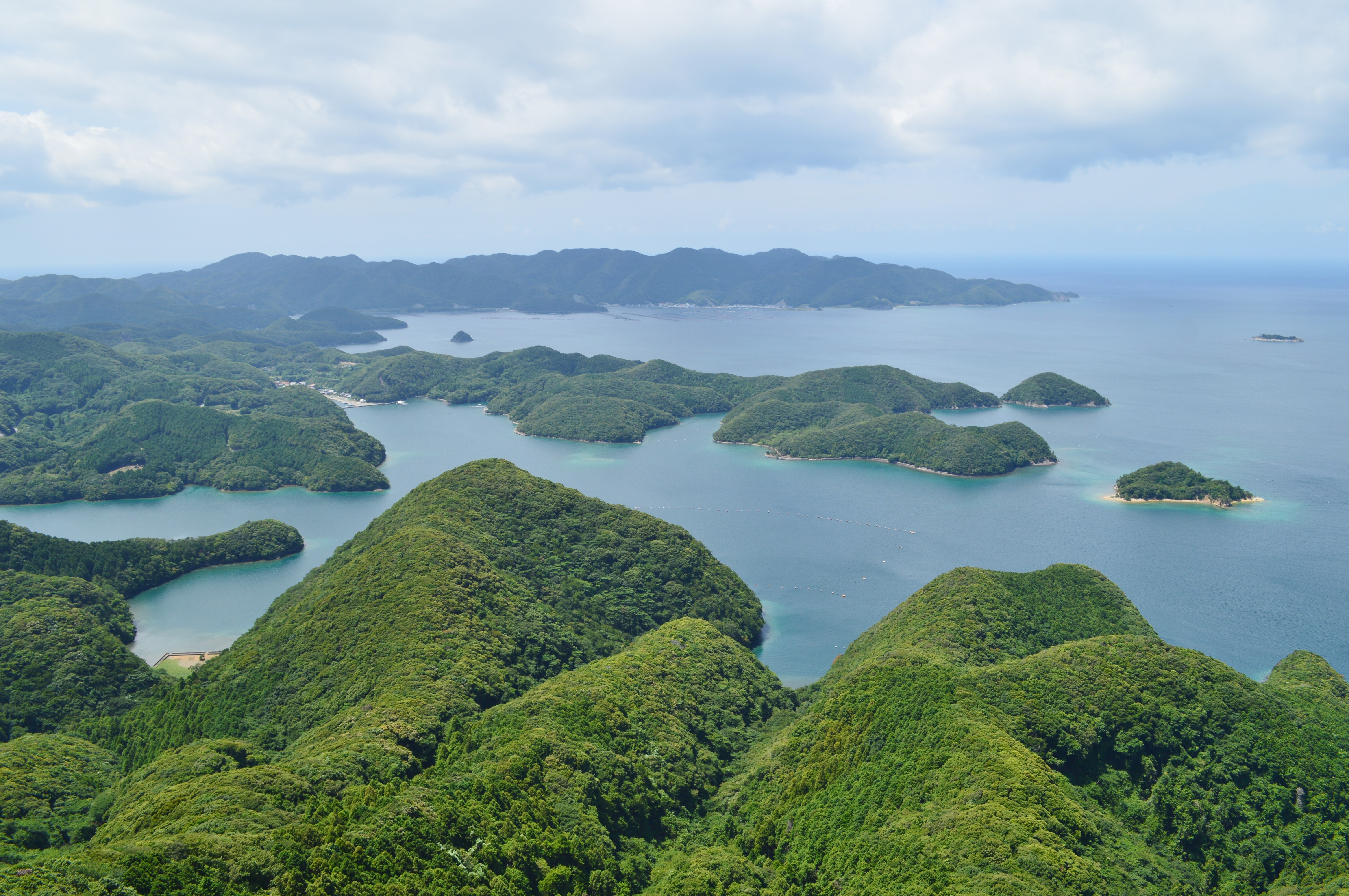 城山から望む浅茅湾